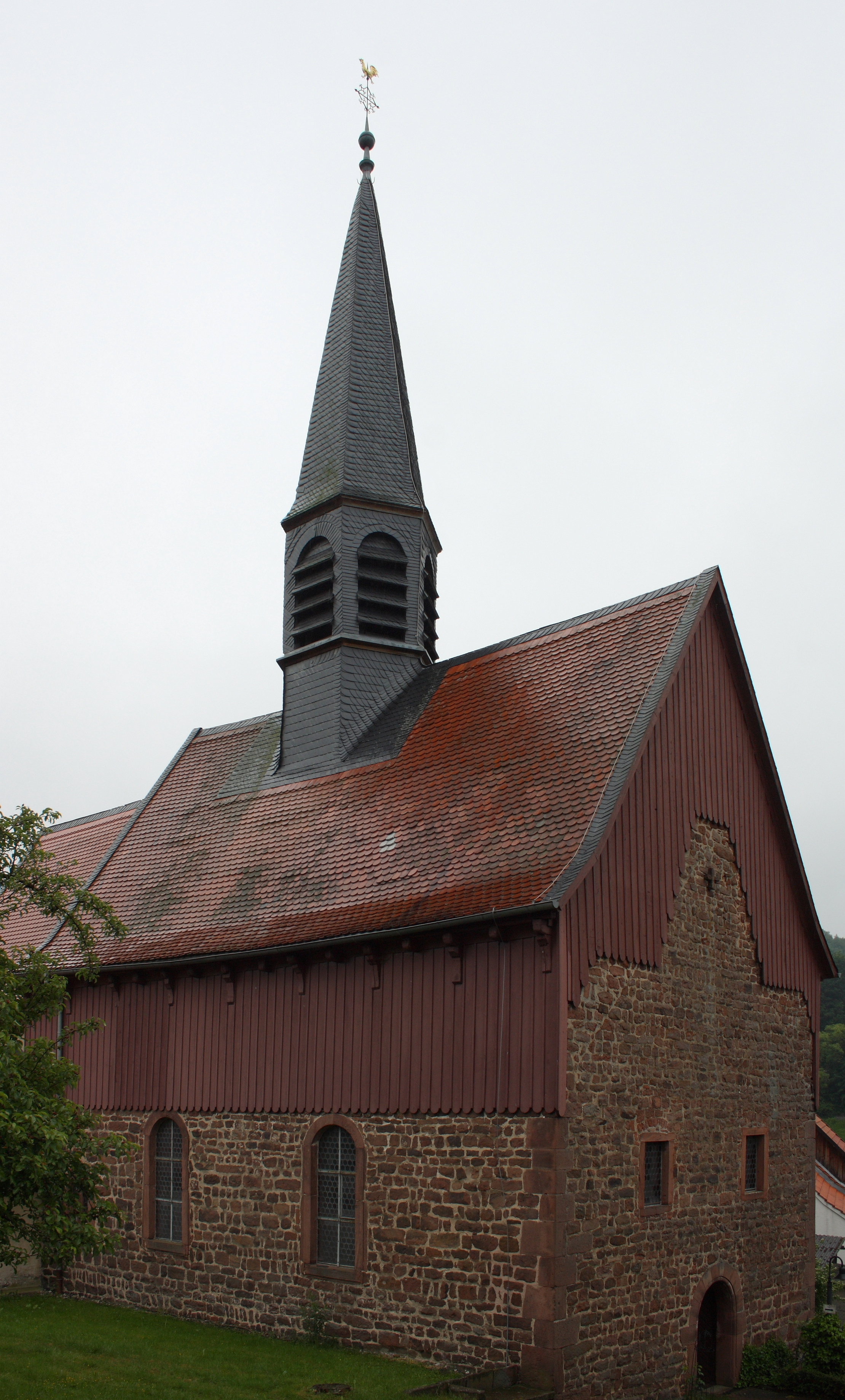 Evangelische Kirche in Fraurombach, einem Stadtteil von Schlitz im Vogelsbergkreis (Hessen)